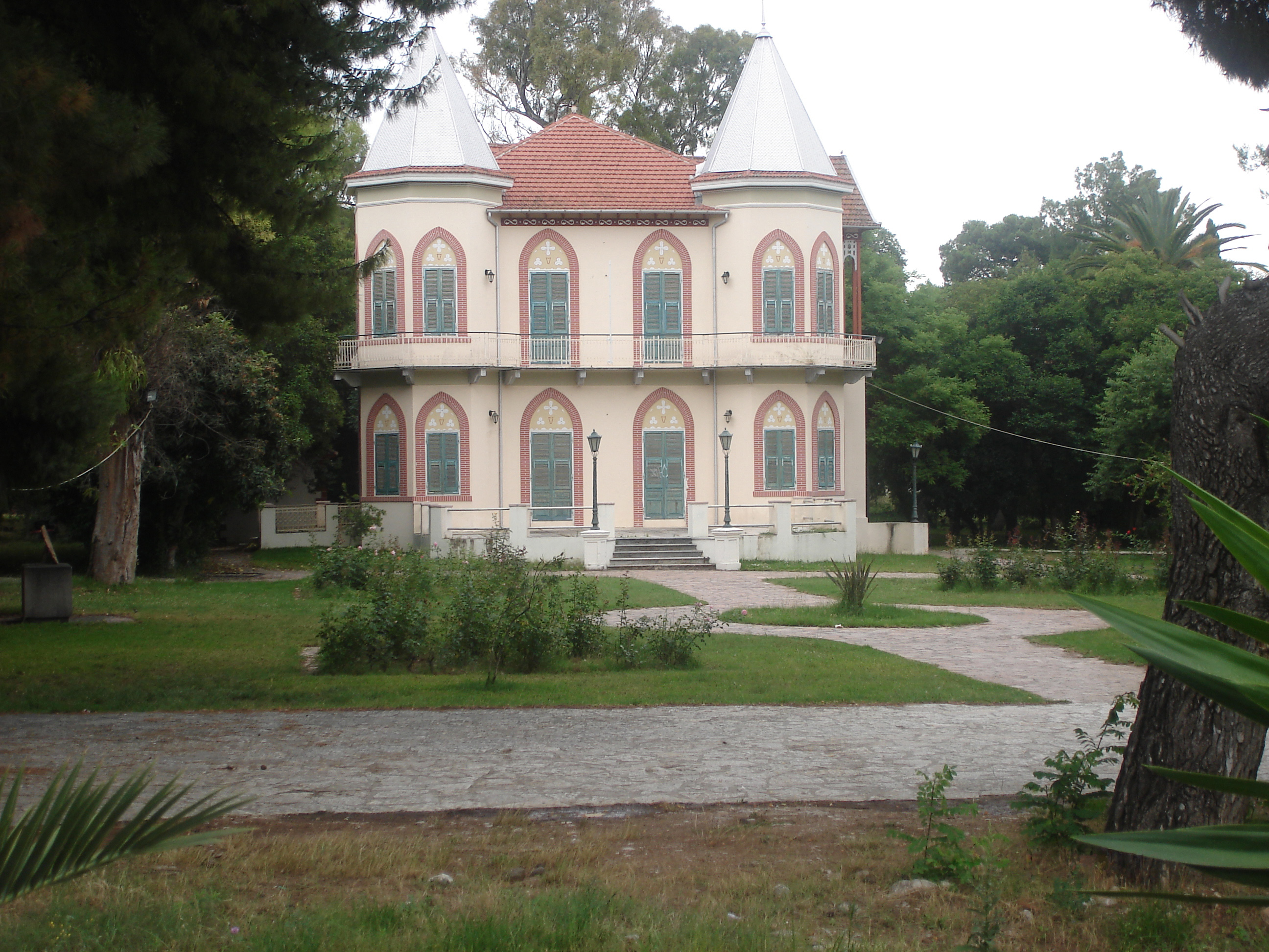 Kollas_House (Villa Kolla),Tecnologi school ,Patra ,GreeceΒίλα Κόλλα, οικία Κόλλα σήμερα βρίσκεται μέσα στο ΤΕΙ Πατρών δωρεά οικογένειας Κόλλα.